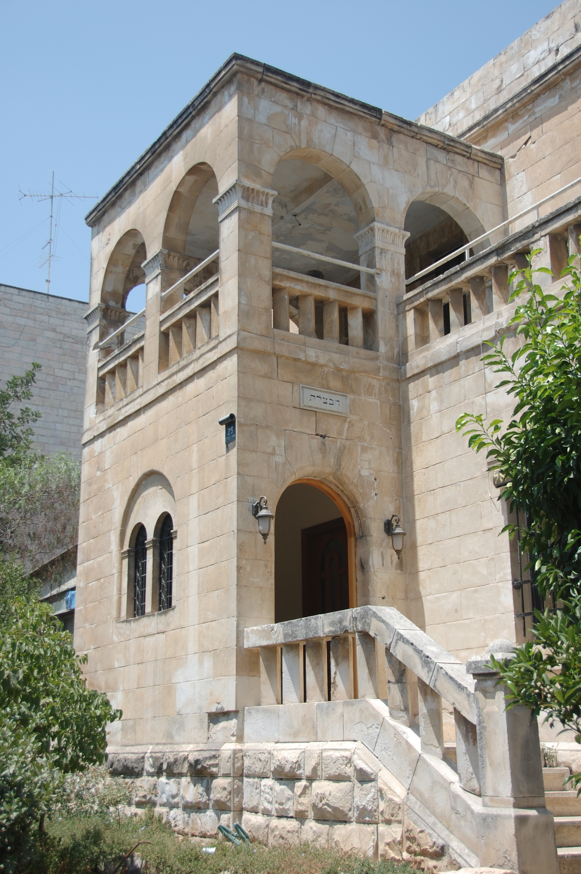 בית חבצלת. בית גד פרומקין או בית חבצלת הוא מבנה בשכונת רחביה בירושלים, ביתו של פרומקין שימש אתר מפגש לנכבדי העיר, בכירי פקידי השלטון הבריטי, הנציב העליון עצמו.